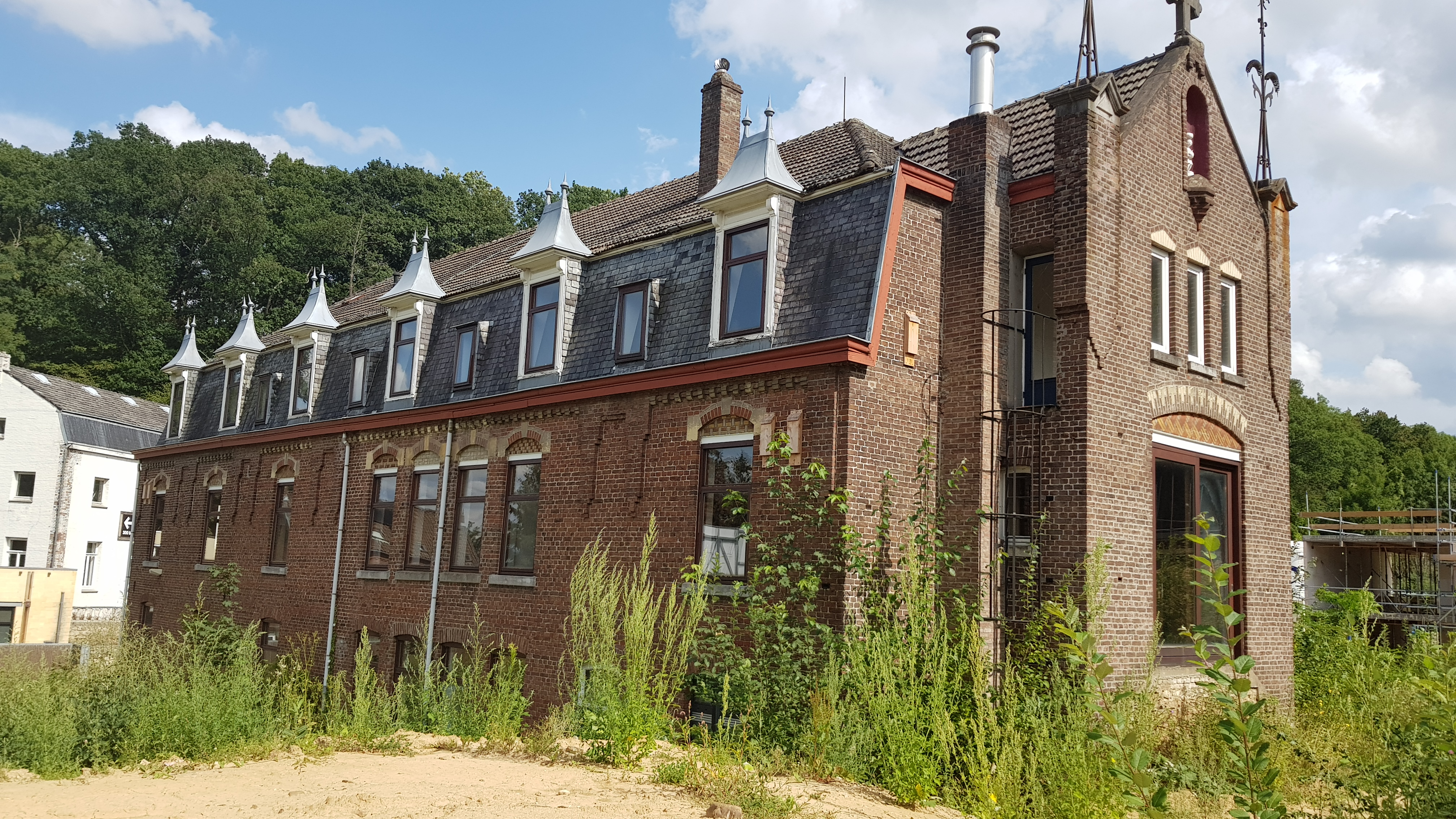 Rijksweg 8, Cadier en Keer, Nederland. Voormalig klooster van de uit Frankrijk gevluchte Soeurs de la Misericorde (1902-1969). Tot 2006 Centrum Ontwikkeling der Volkeren, opgericht door pater Frans van Lieshout O.M.I. Daarna verkocht aan Poort van Margraten BV. Anno 2019 wordt het complex herontwikkeld tot woningbouw.